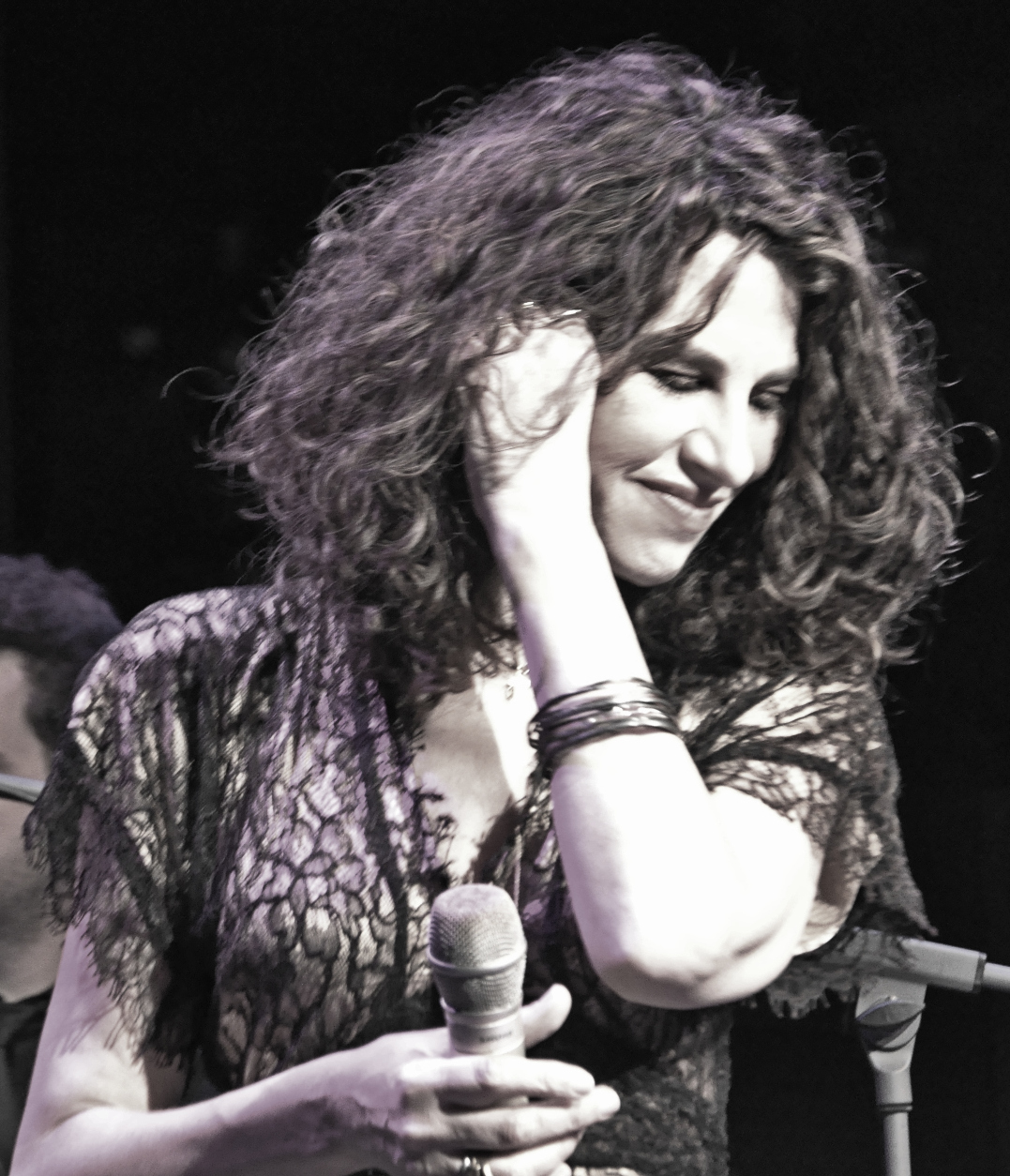 απο το Gazarte